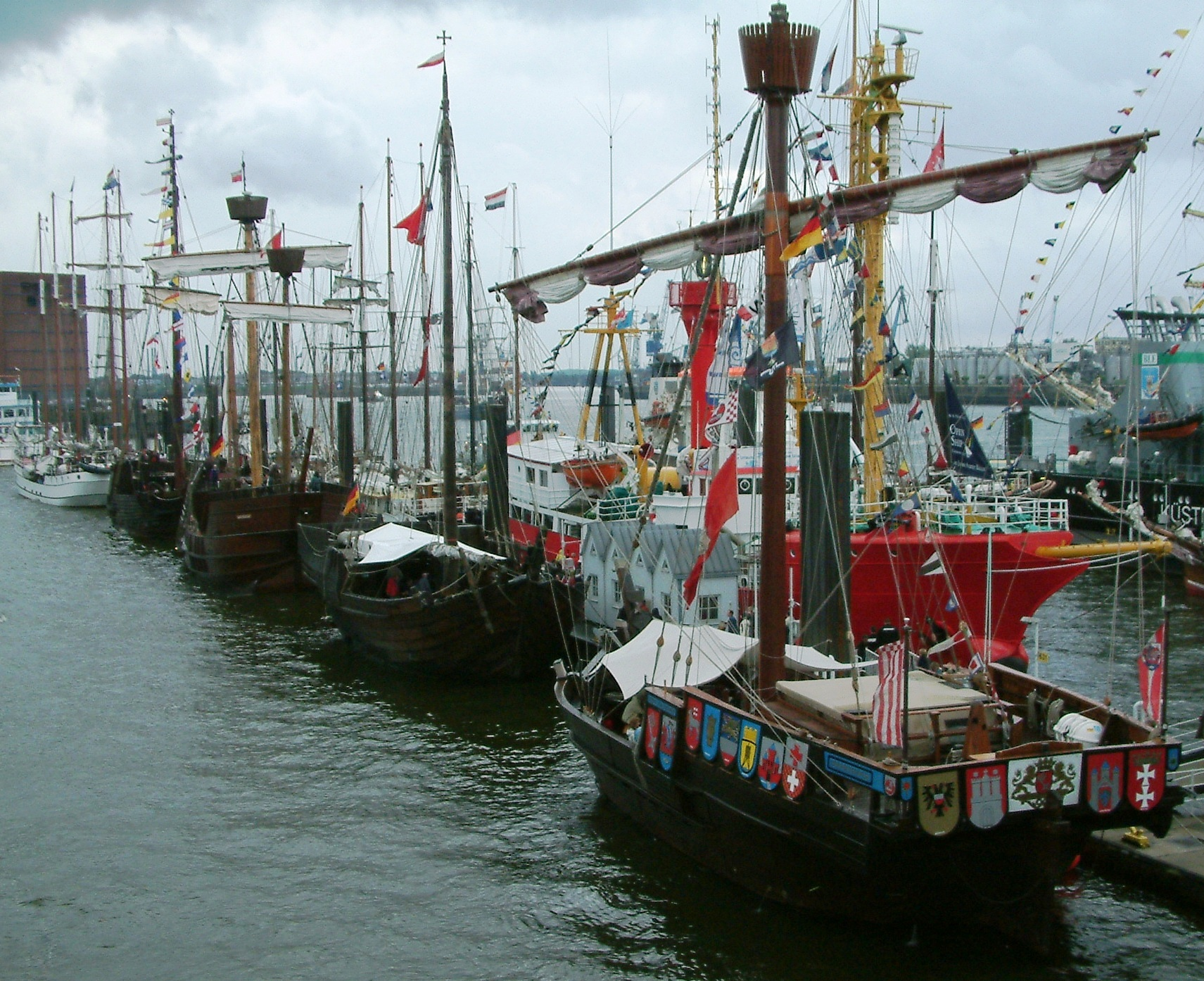 Vier Kogge-Nachbauten beim Hamburger Hafenfest